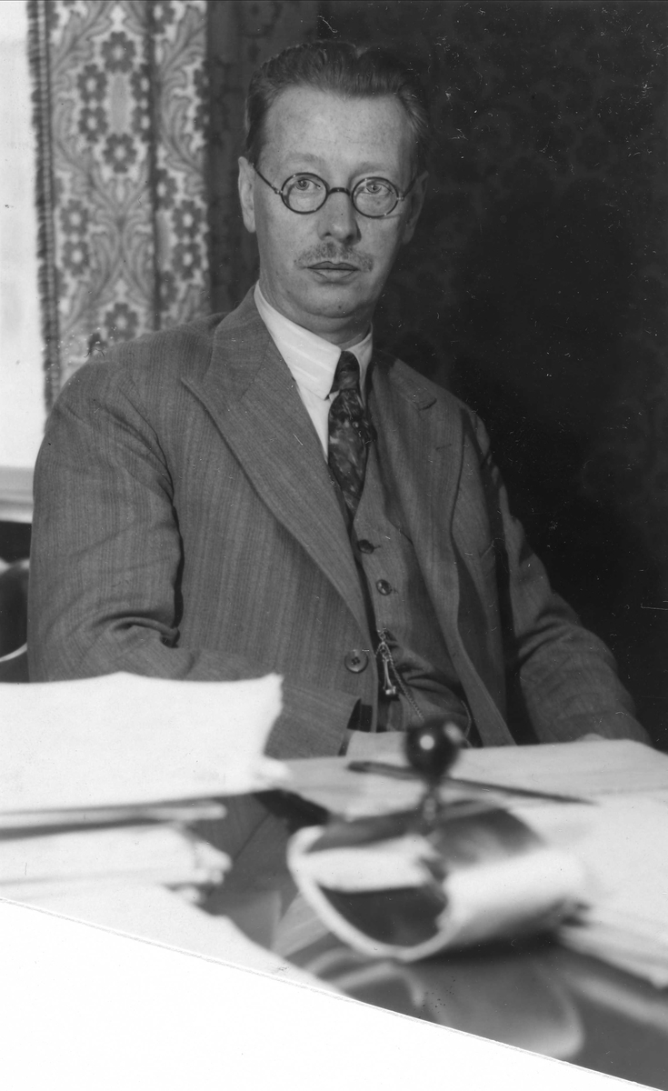 Andreas Juell, direktør i NKL fra 1919 til 1948. Fotografert ca. 1920-1930